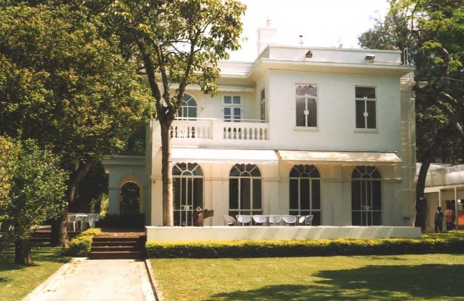 財政司司長官邸 Residence of Financial Secretary, No. 45 Shouson Hill Road, Wong Chuk Hang